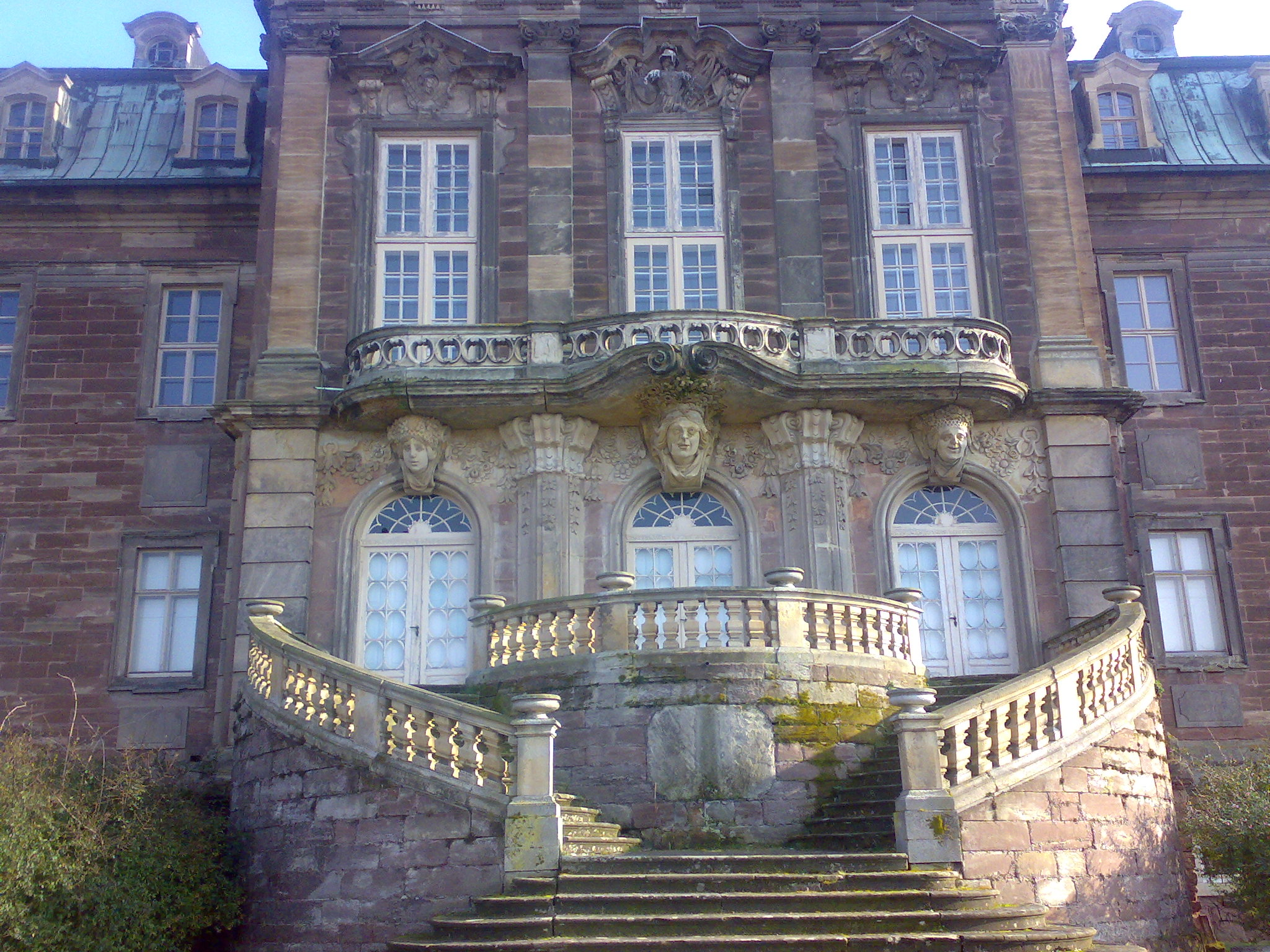 Portal Schloss Burgscheidungen